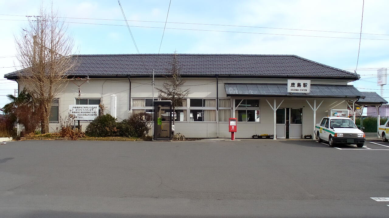 常磐線鹿島駅